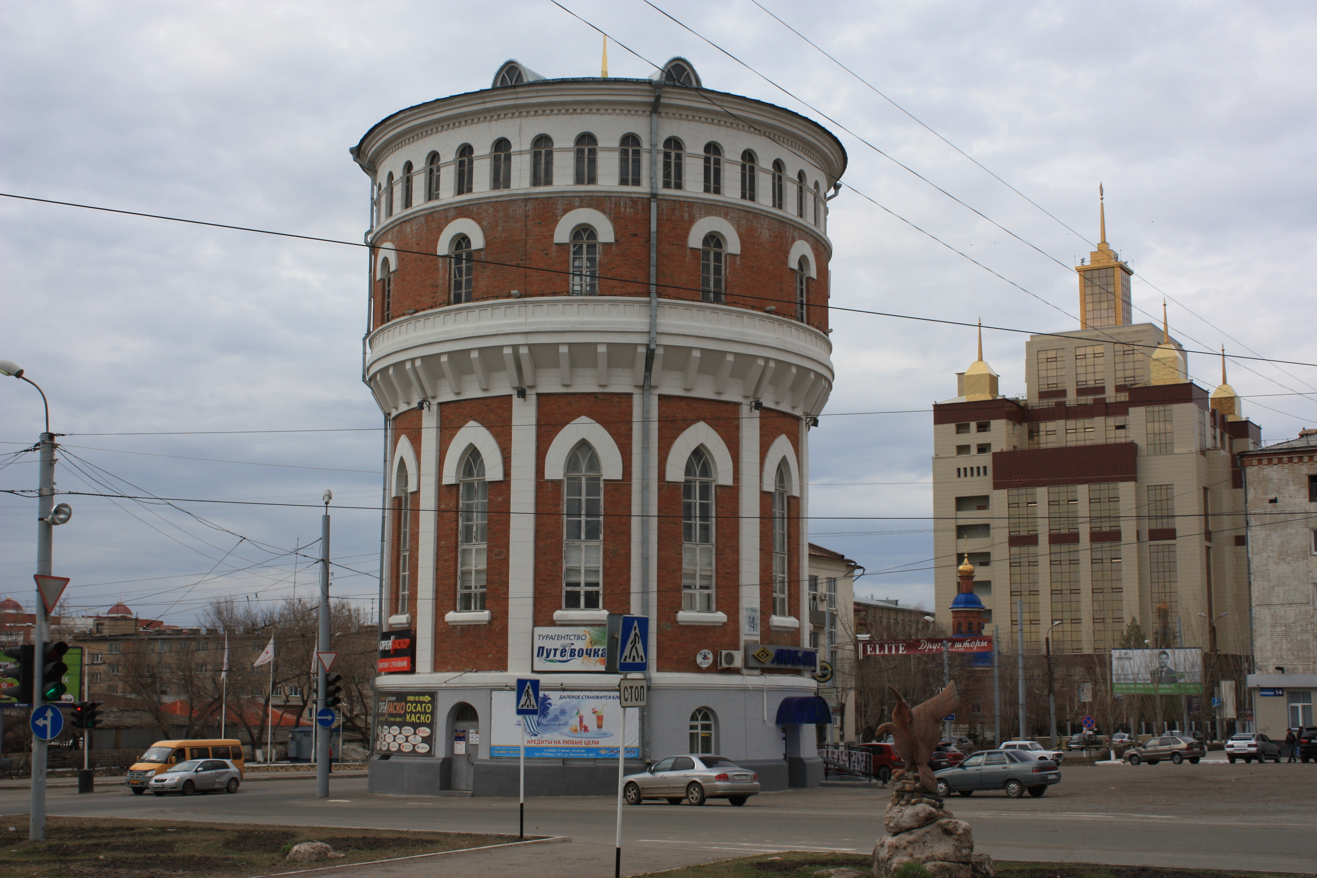 Tsentralnyy rayon, Orenburg, Orenburgskaya oblast', Russia